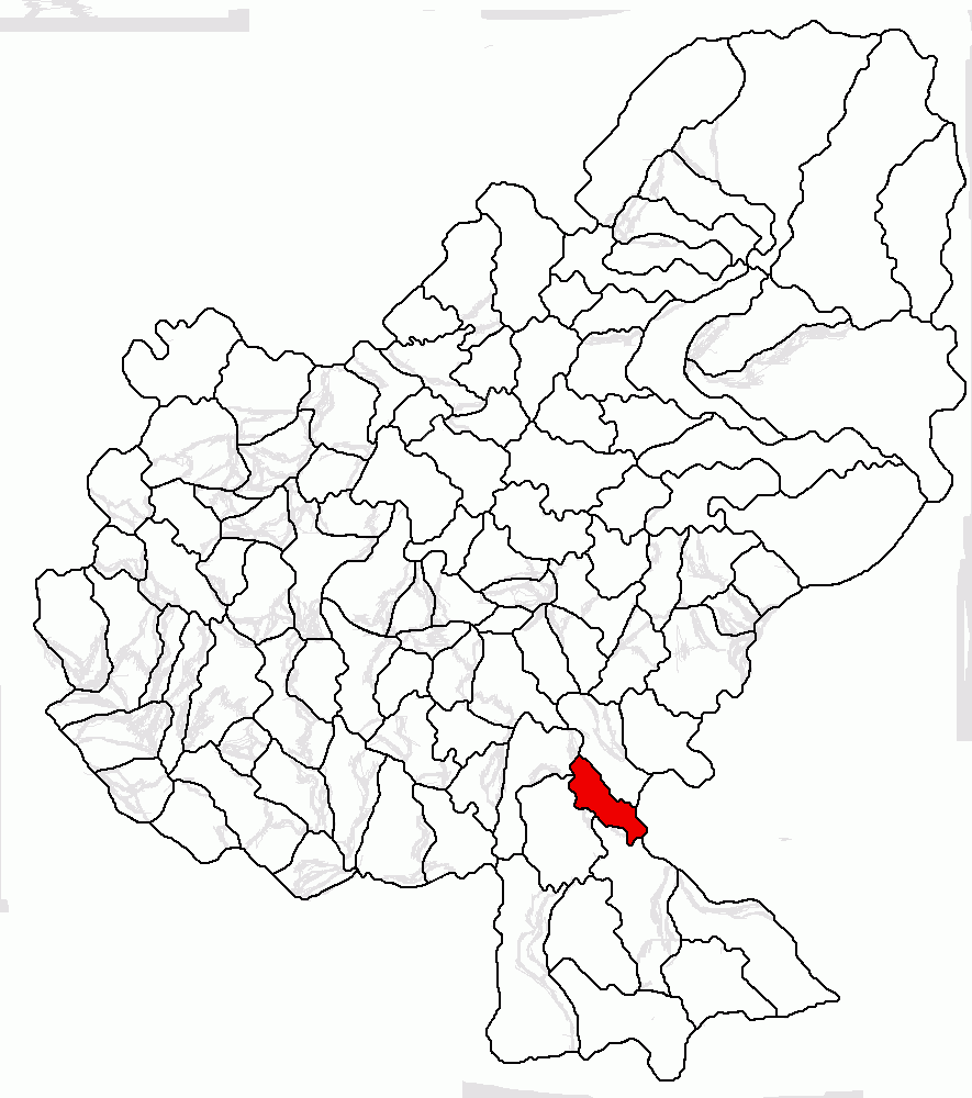 Categorie:Hărţi ale judeţului Mureş